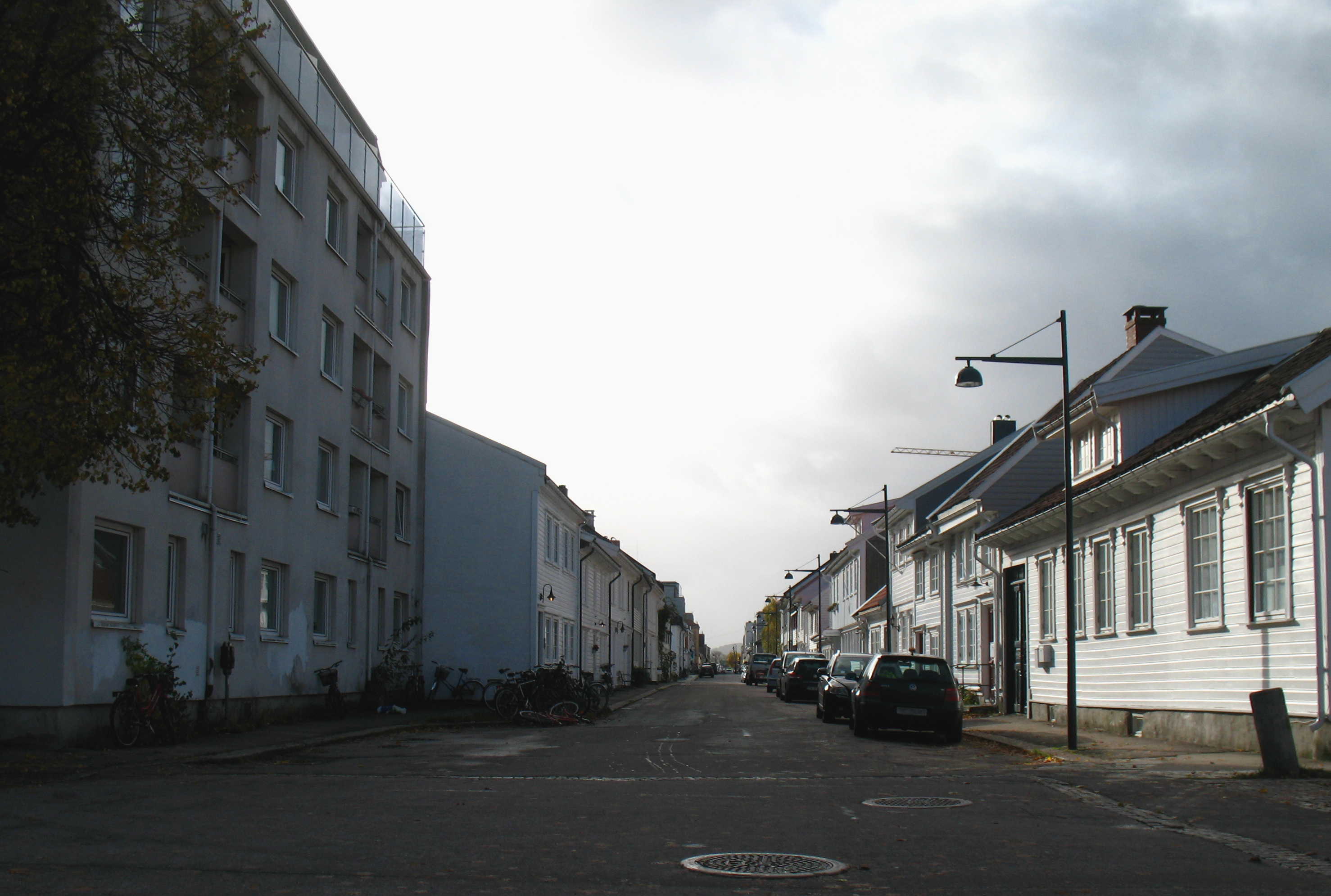 Skippergata der den krysser Kronprinsens gate i bydelen Kvadraturen / Eg i Kristiansand.